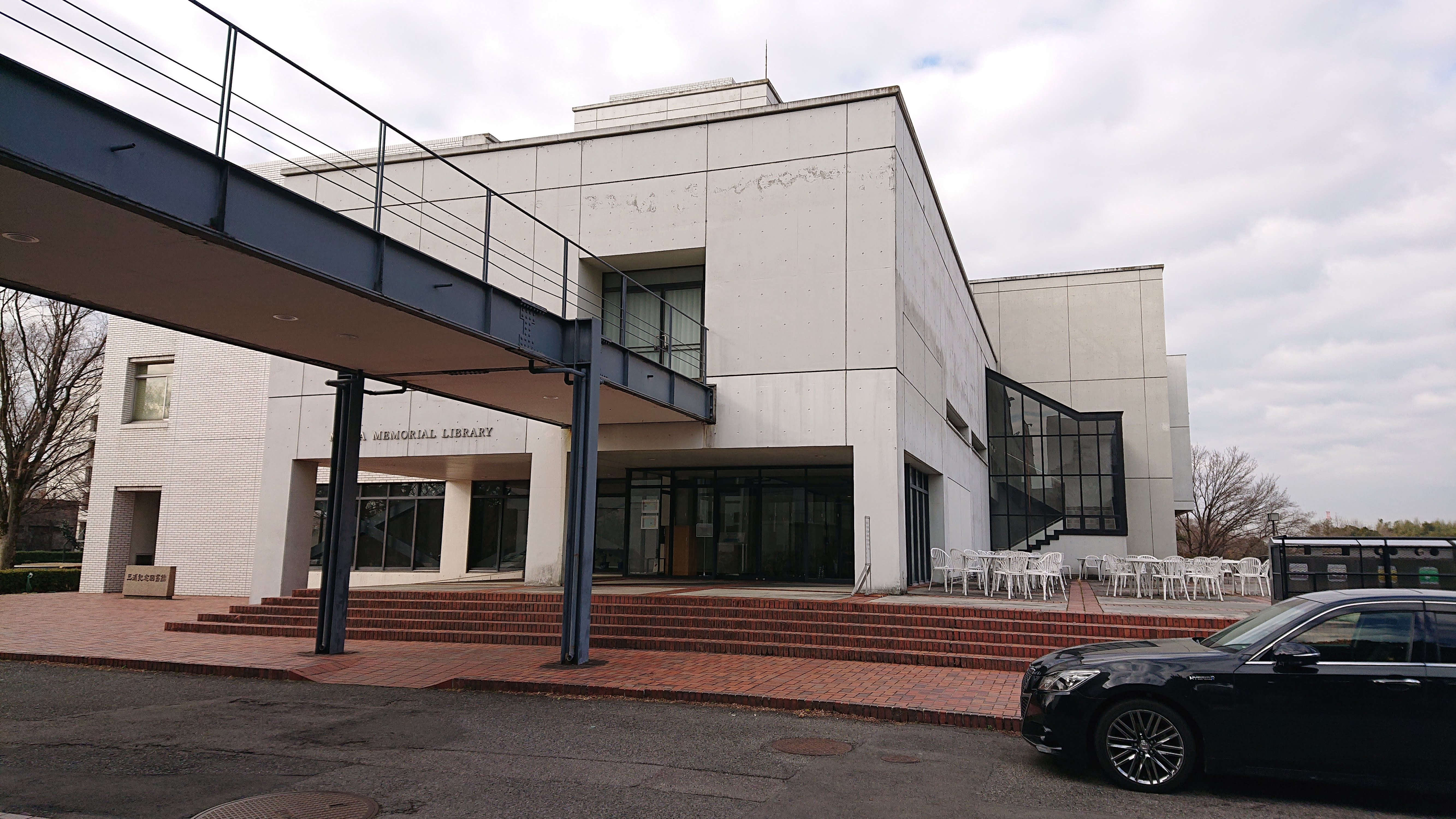 中部大学三浦記念図書館